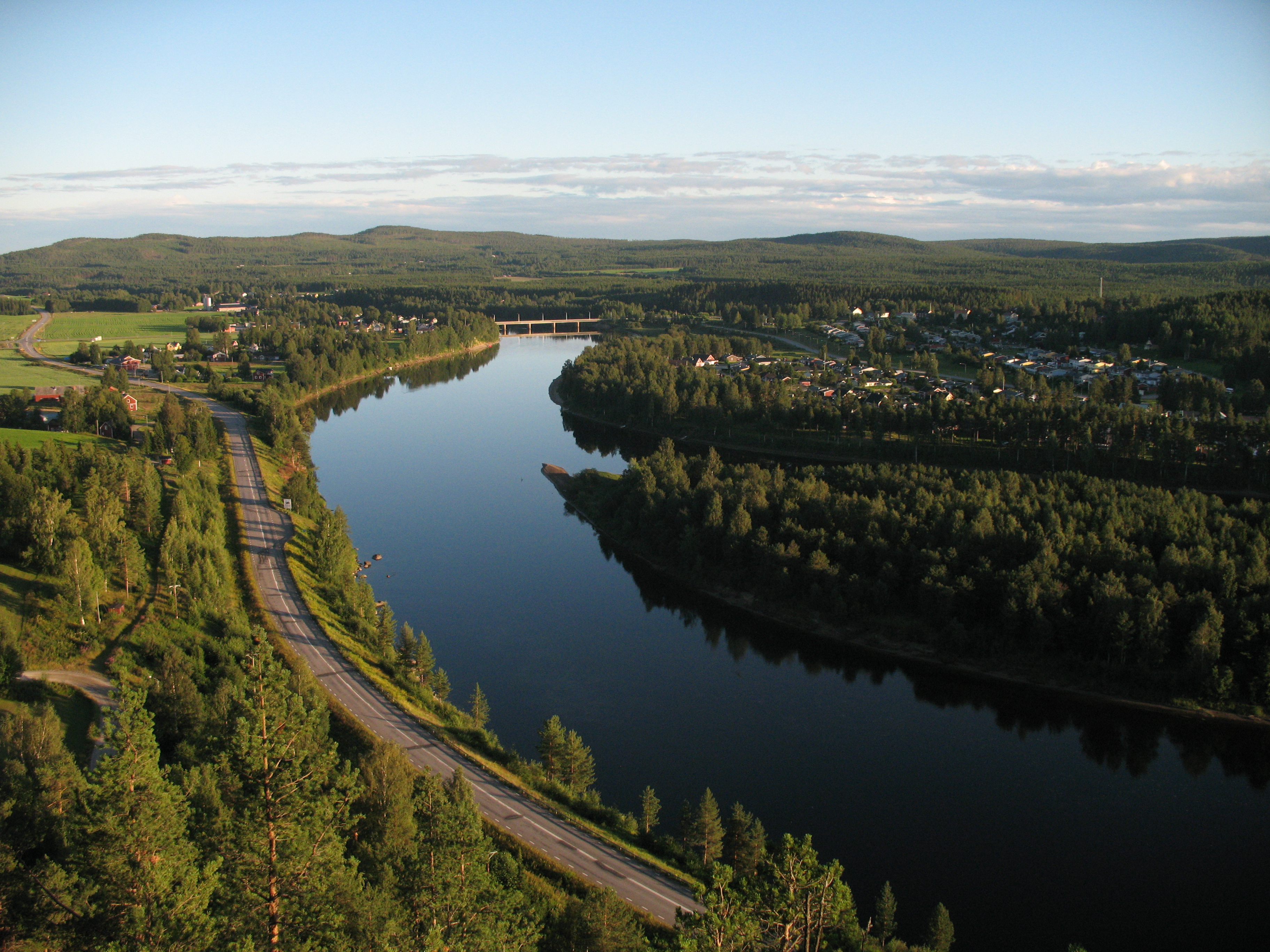 Vy från Hundberget i Älvsbyn. Pite-älven, Norrabyn och bostadskvarteret Östermalm.